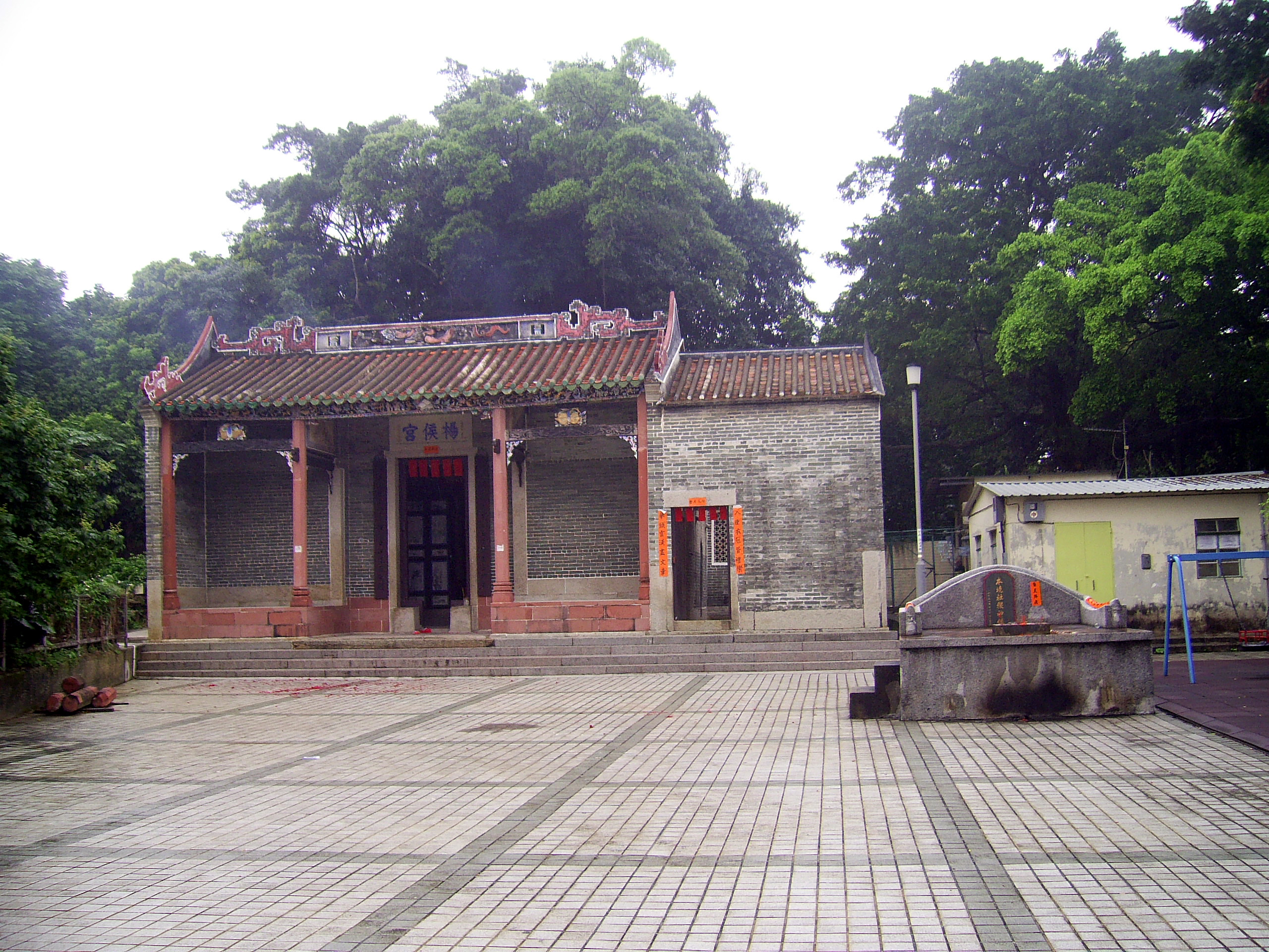 中文（香港）: 廈村楊侯宮